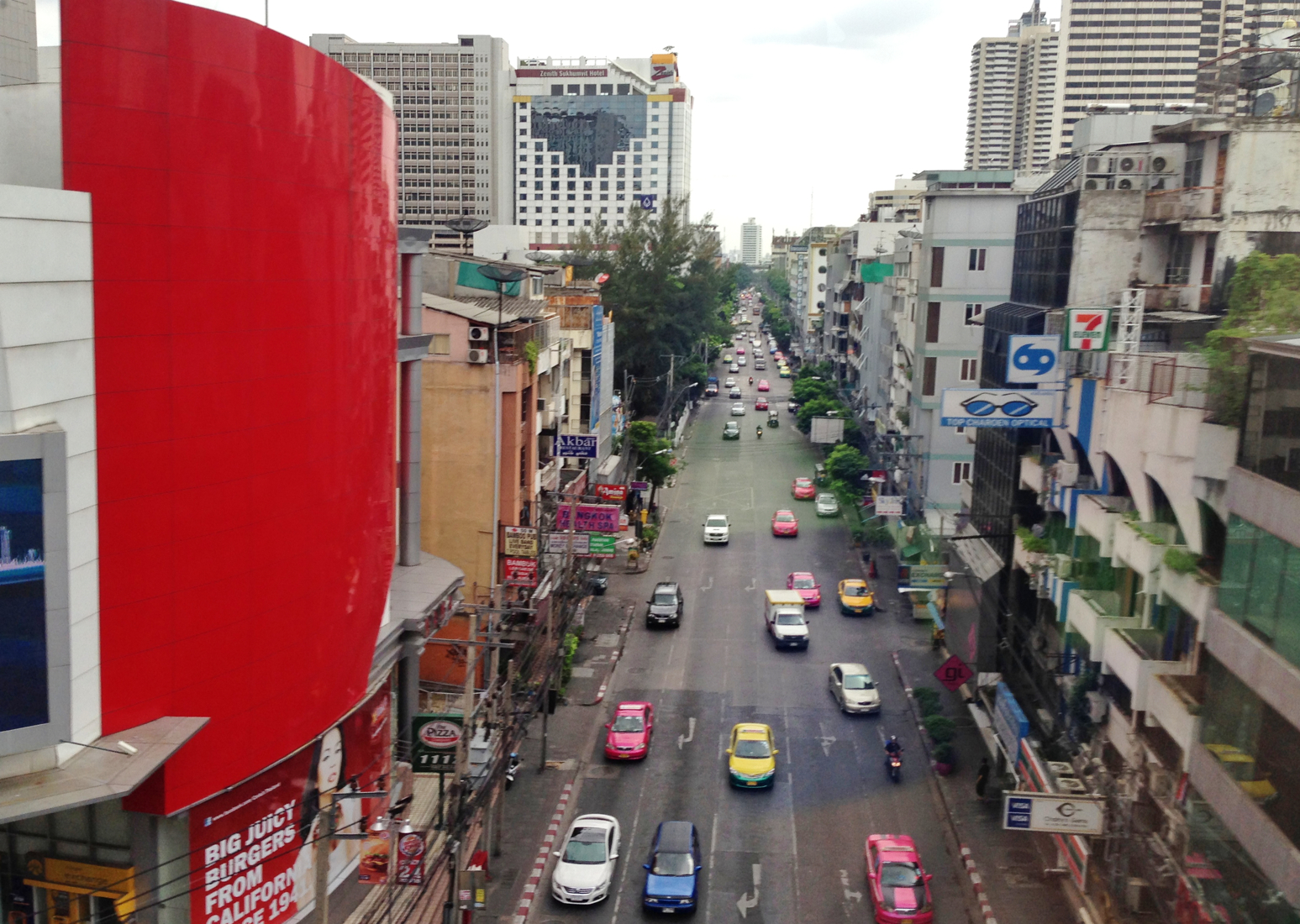 Nana nuea, khlong Toei, bangkok thailand